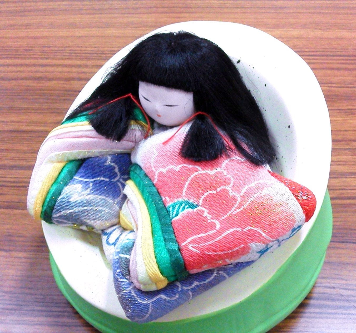 木目込み人形 かぐや姫